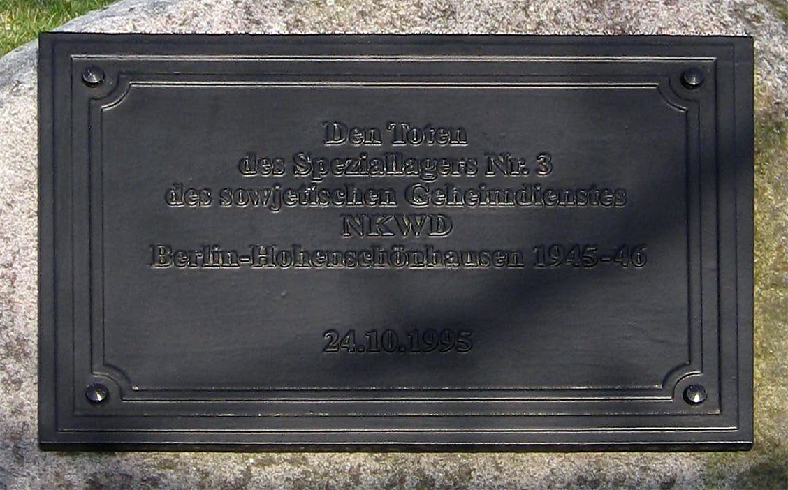 Gedenkstein auf dem Friedhof an der Gärtnerstraße / Ferdinand-Schultze-Straße für die Opfer des Speziallagers 3 in Berlin-Hohenschöhnhausen.